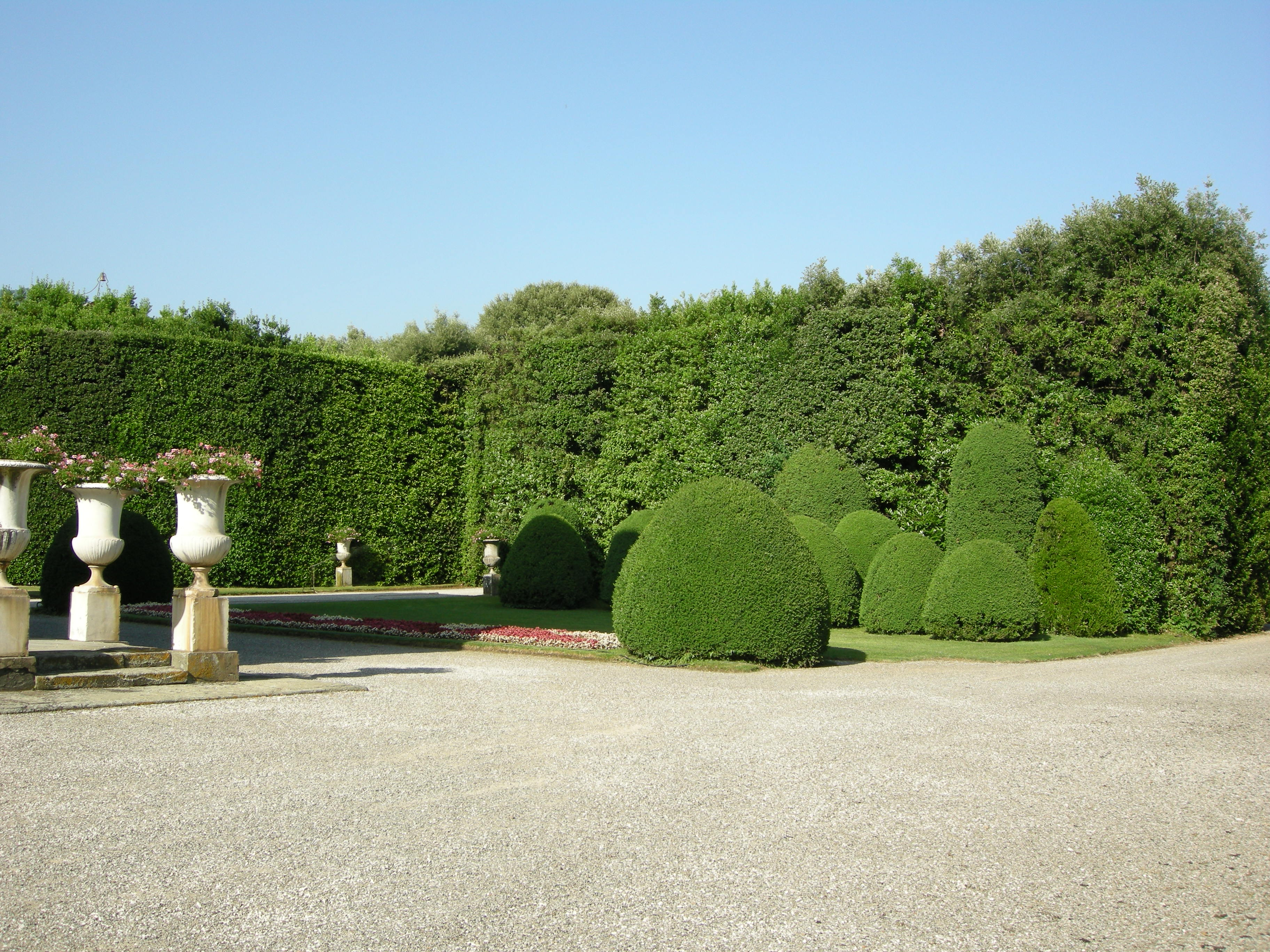 Garden vases — Villa Reale di Marlia — Tuscany.